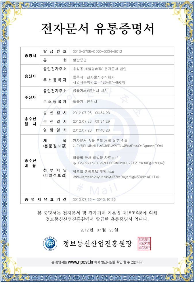 공인전자주소를 통하여 전자문서가 송신 또는 수신되거나 열람사실 정보가 포함된 증명서